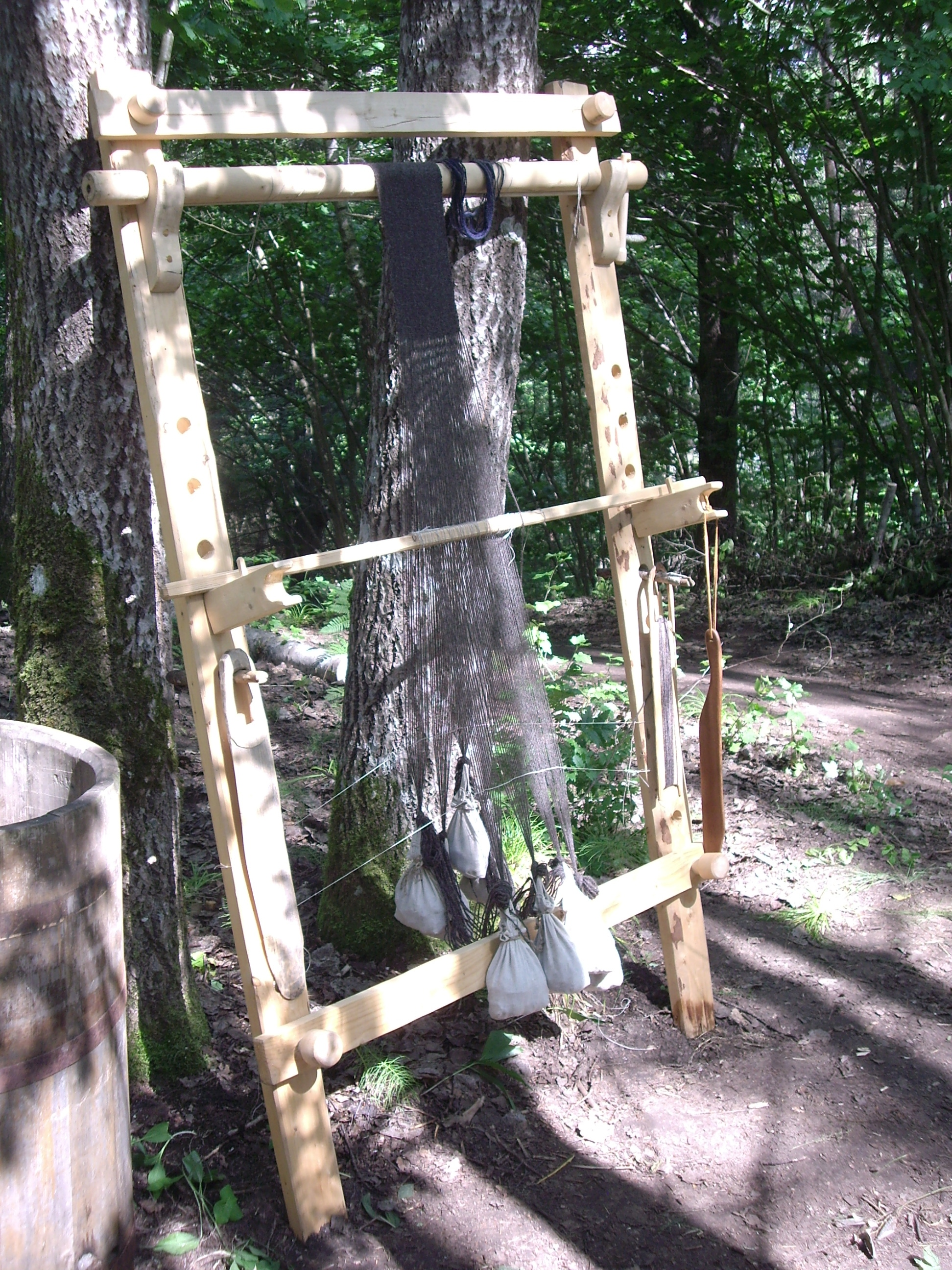 Püsttelgedel kudumine